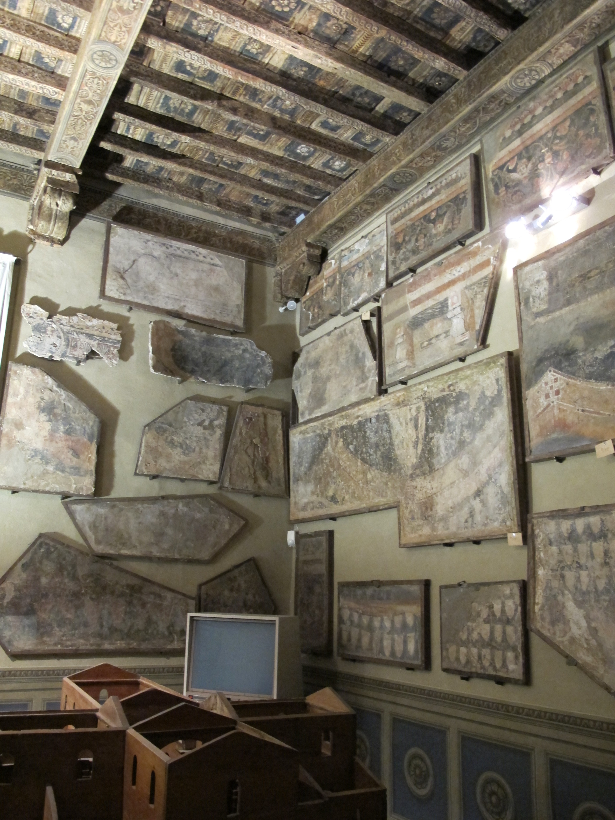 San marco, sala frammenti affreschi centro di firenze